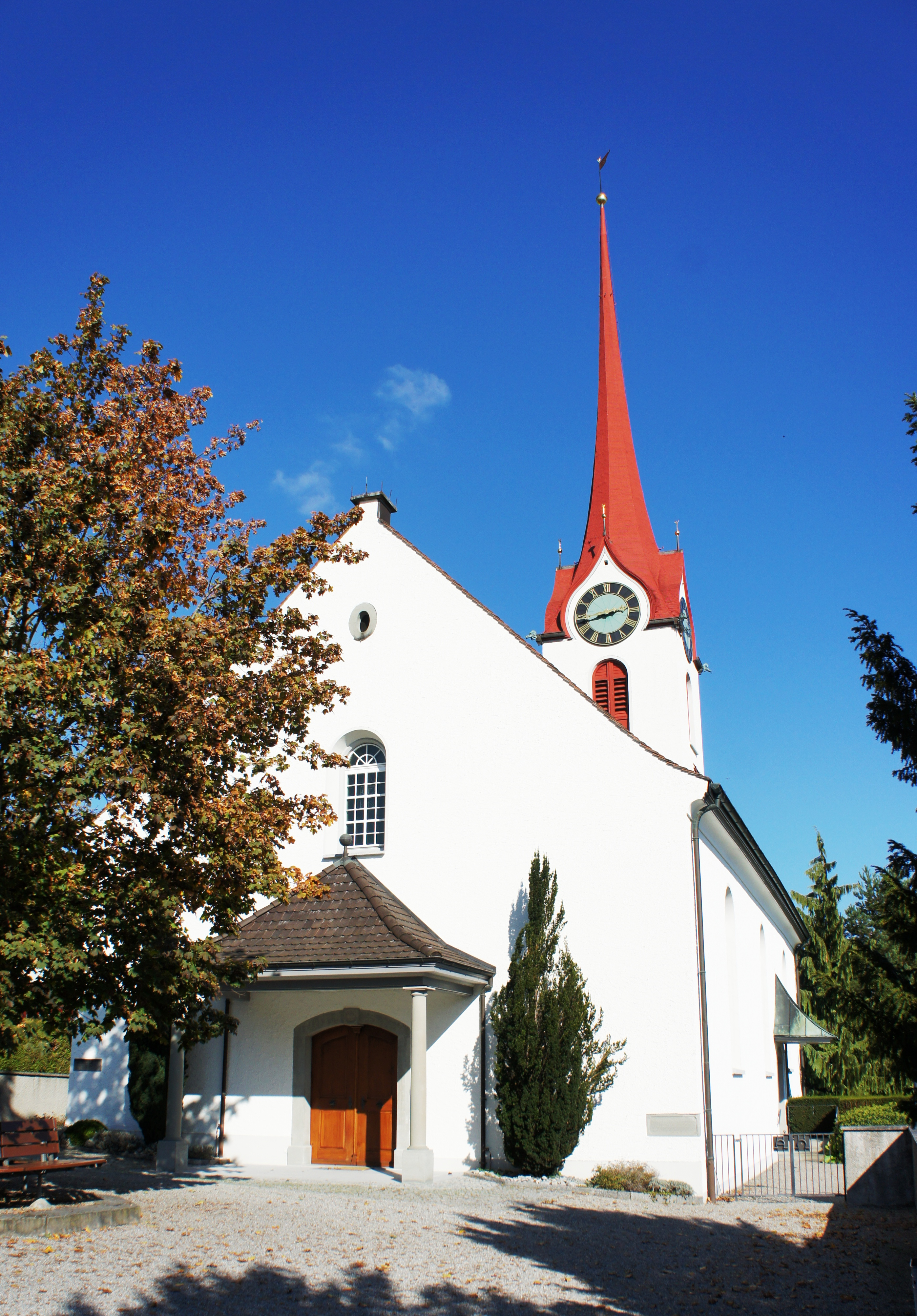 Die ref. Kirche in Rebstein SG aus Südwesten. Im Vordergrund der gepflästerte Vorplatz, in dessen Mitte steht ein Baum mit Sitzbänken umgeben. Stufenlos geht es zum überdachte Haupteingang an der Südwestfassade. Im Zentrum der Nordostfassade steht der Kirchturm mit Uhr und spitzigem, rotem Dach. Zuoberst ist eine Windfahne.